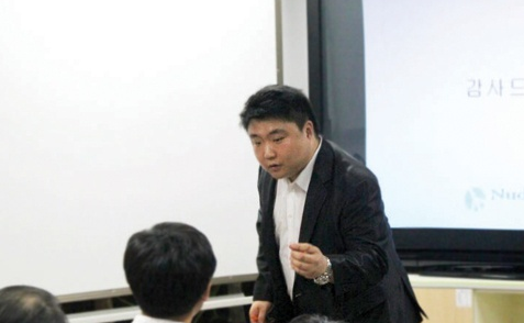 한국어 (조선): 강의중인 국도형 대표